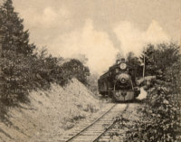 The 'Huckleberry Express' on the Catskill and Tannersville Railway's on its daily trip from Tannersville to Otis Summit in Kaaterskill